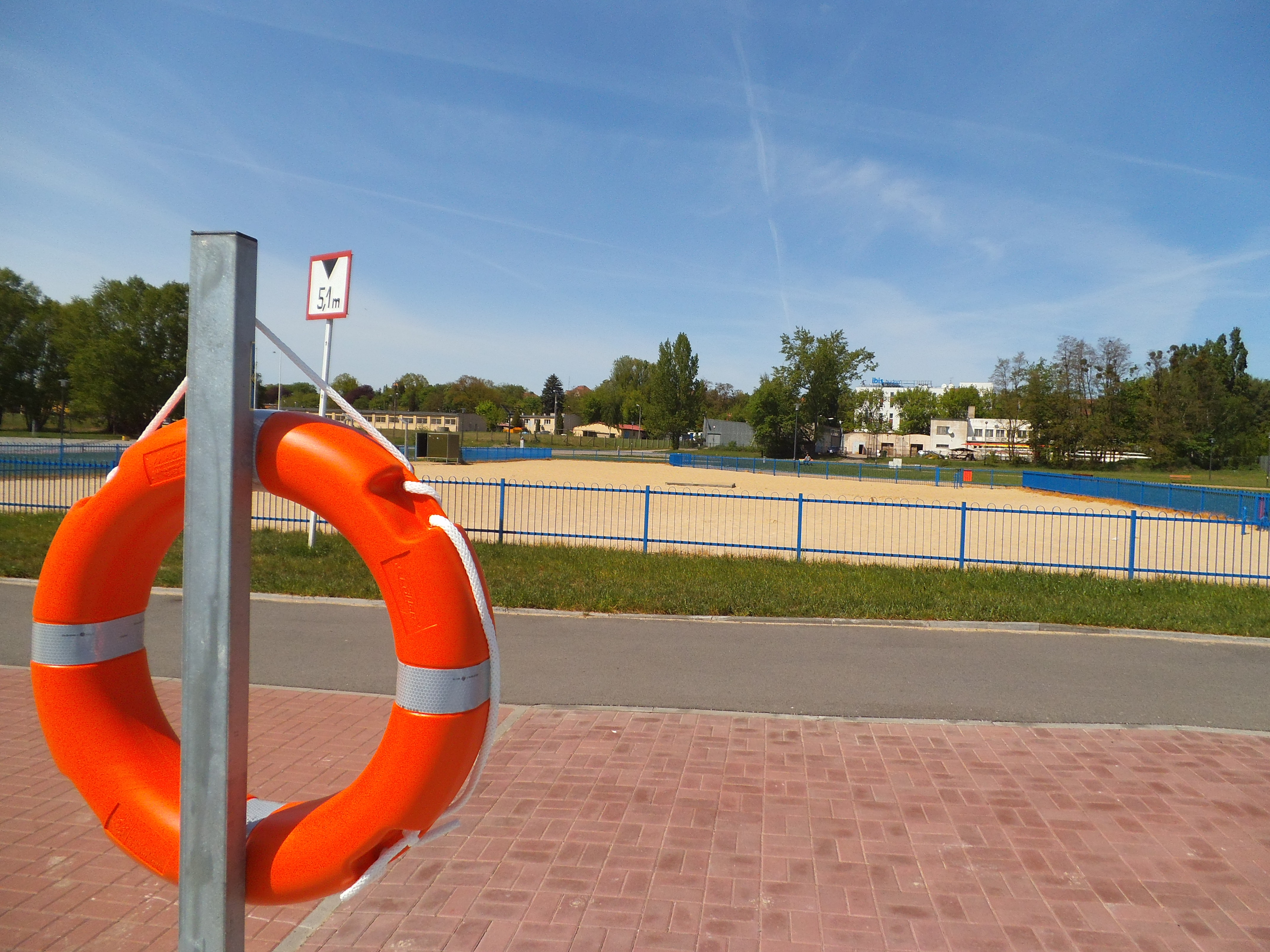 plaża w Toruniu